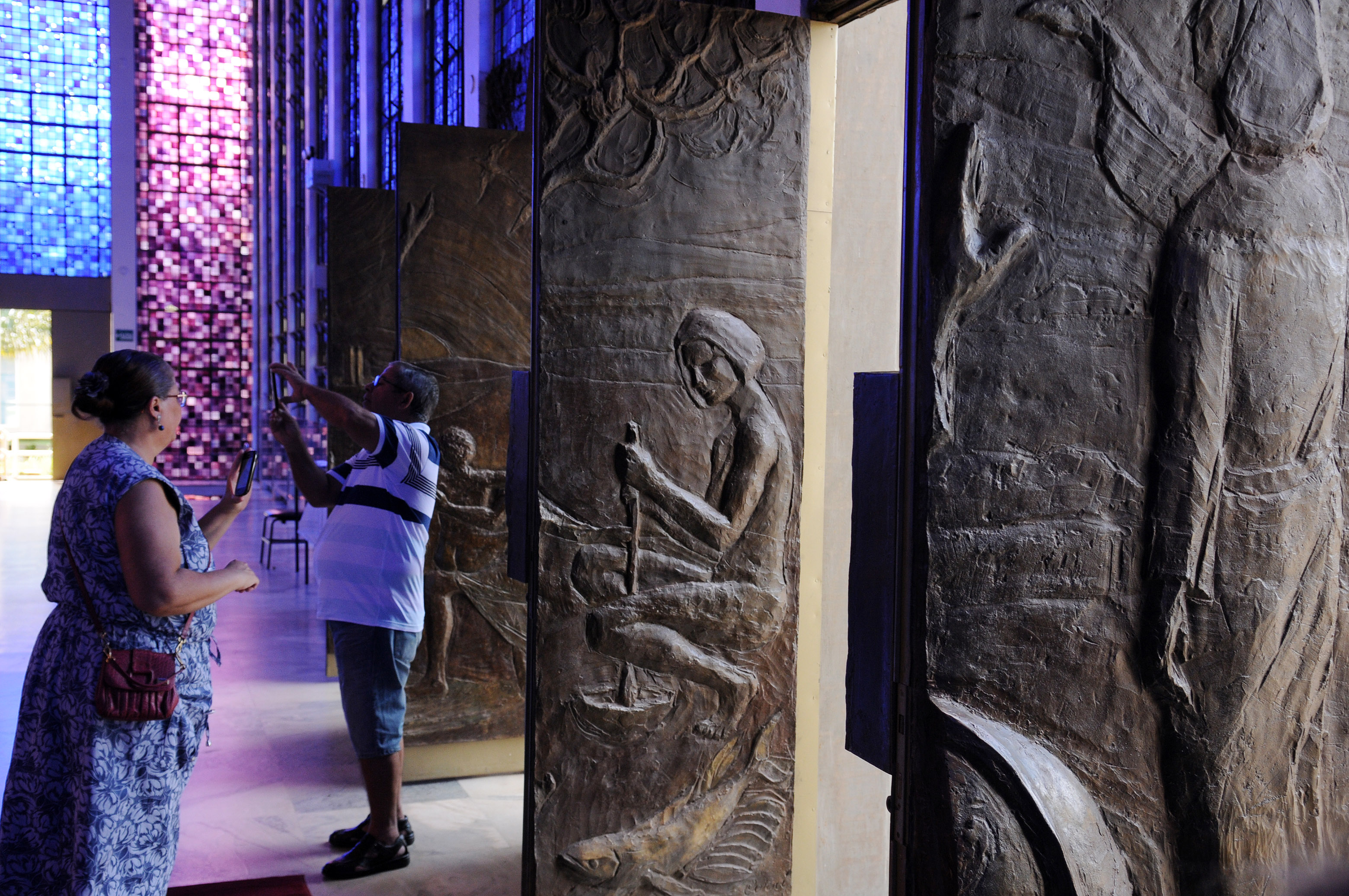 Asa Sul, Brasília, DF, Brasil, 6/4/2015 Foto: Pedro Ventura/Agência Brasília